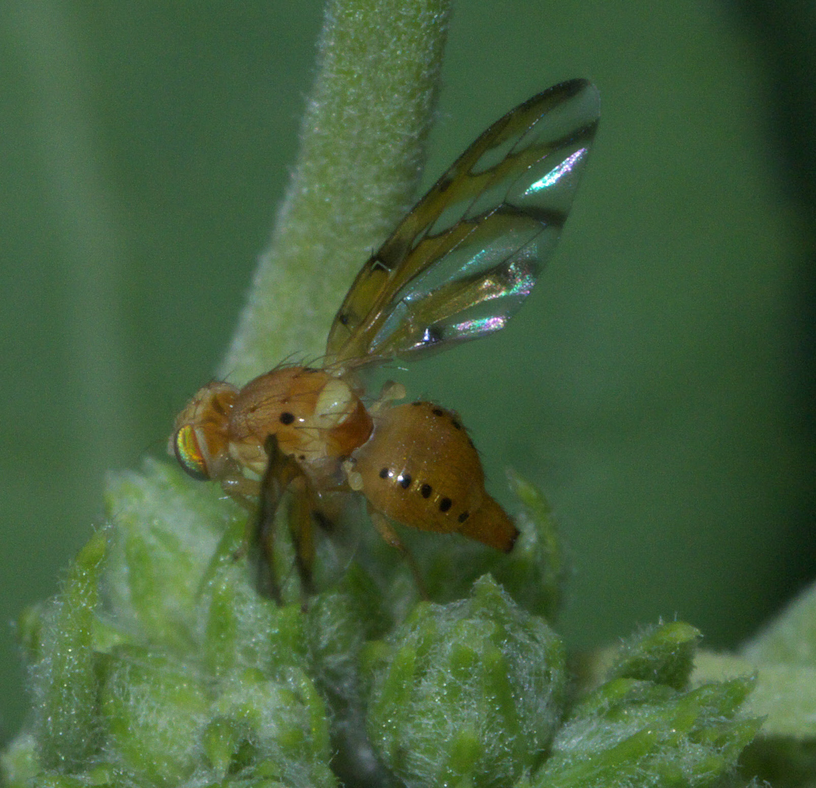 Tomoplagia obliqua, Family: Fruit Flies, ID Confidence: 75